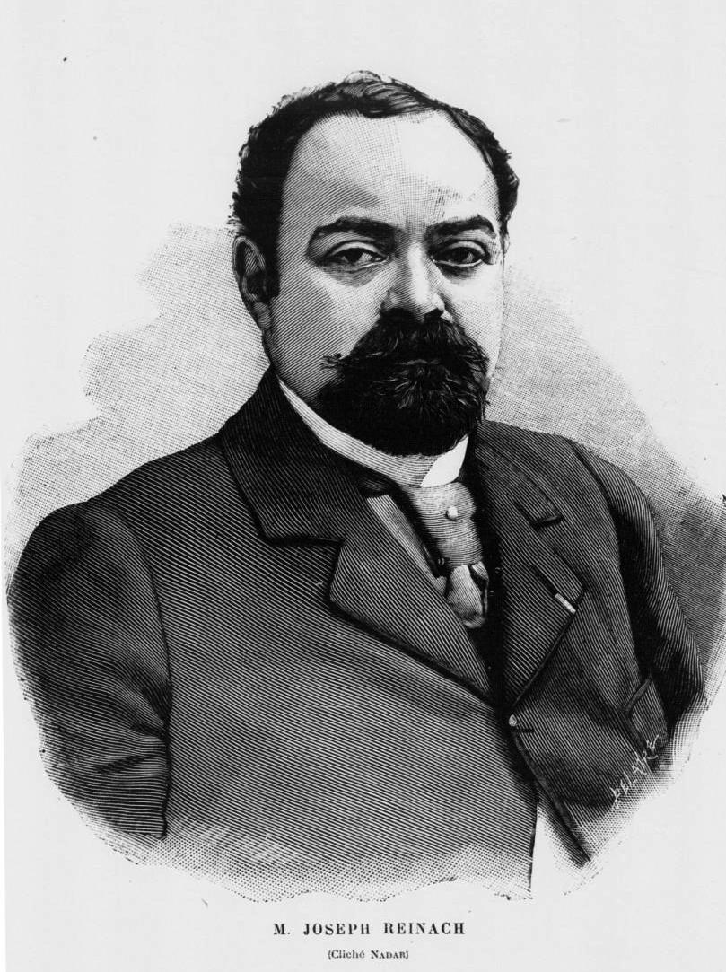 Joseph Reinach par Nadar. Illustration extraite de Ferdinand Walsin Esterhazy, Les dessous de l'affaire Dreyfus, Paris, Fayard, 1898, 226 p., p. 121